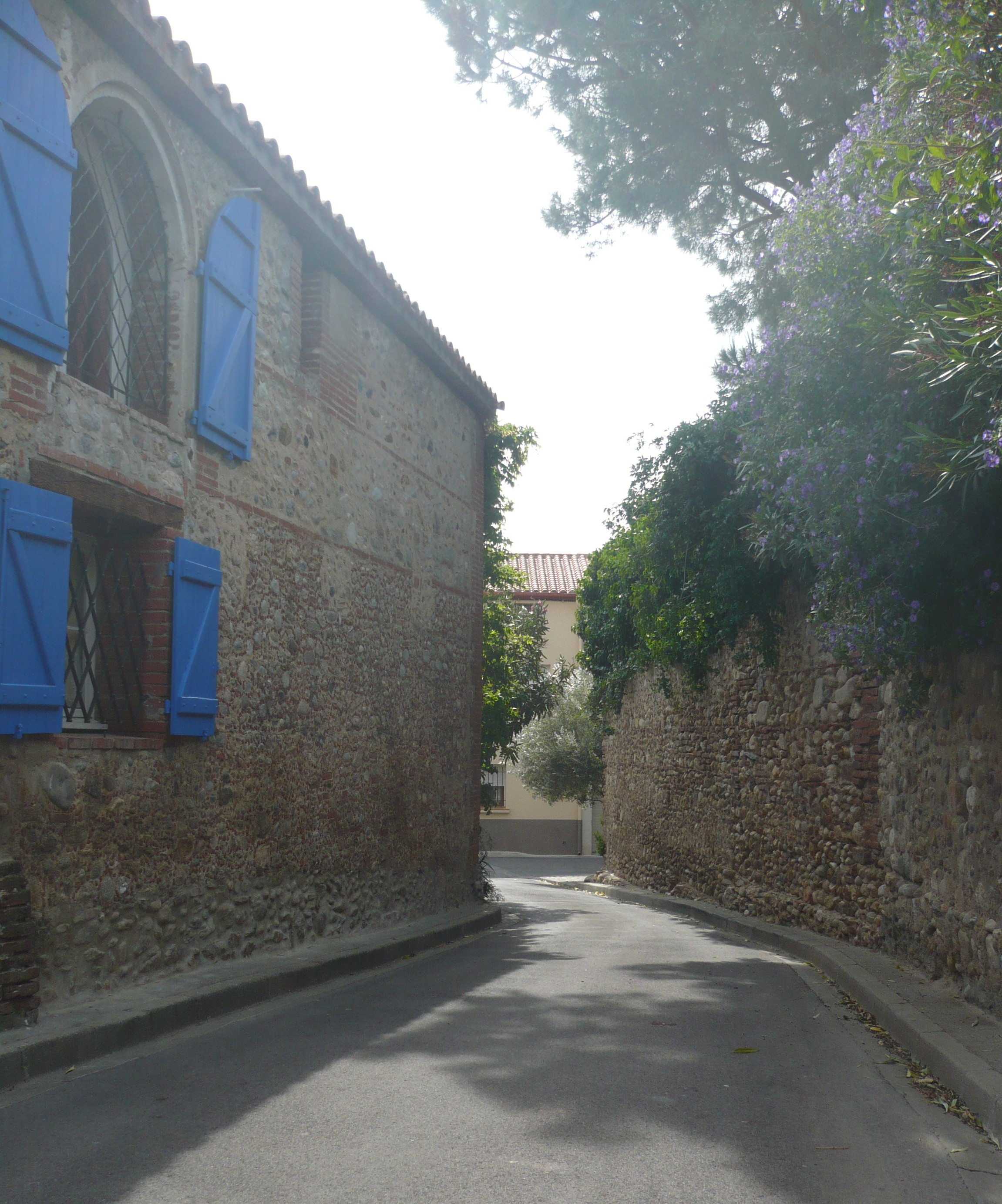 Rue de la Bergerie à Montescot